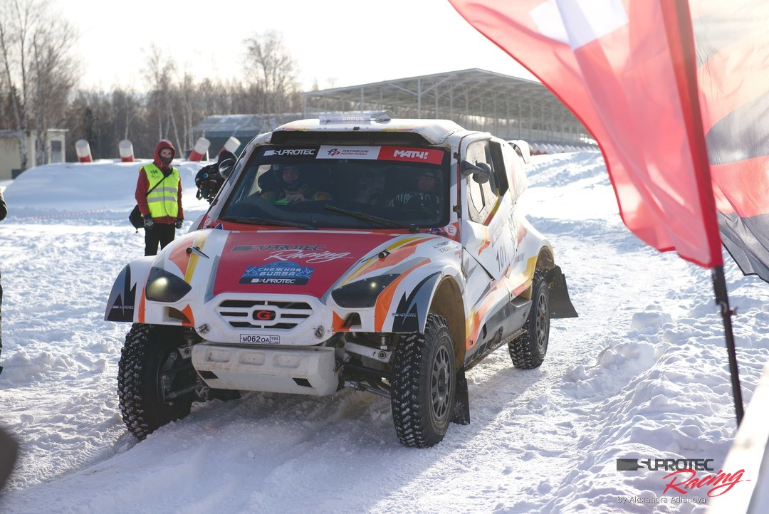 Баха "Снежная битва", "Барс 1". Пилот: Андрей Новиков. Команда - Супротек Рейсинг. Кубок России, 2017